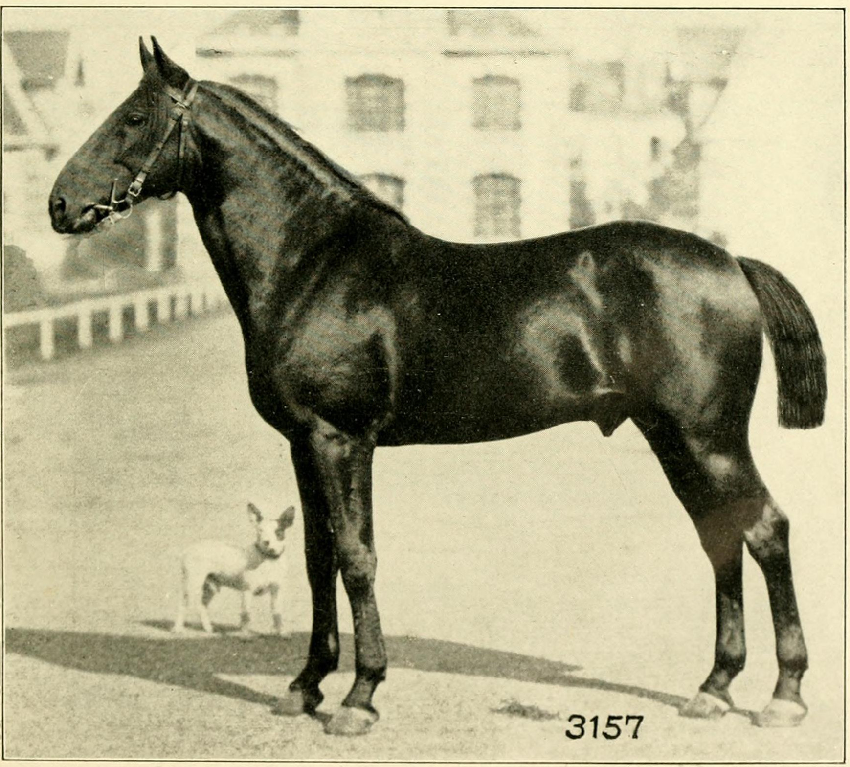 Narqois *1891 - Beschäler im Hengstdepot Saint Lo Das anglo-normännische Pferd : mit besonderer Berücksichtigung seiner Verwendung in Deutschland / Gustav Rau.